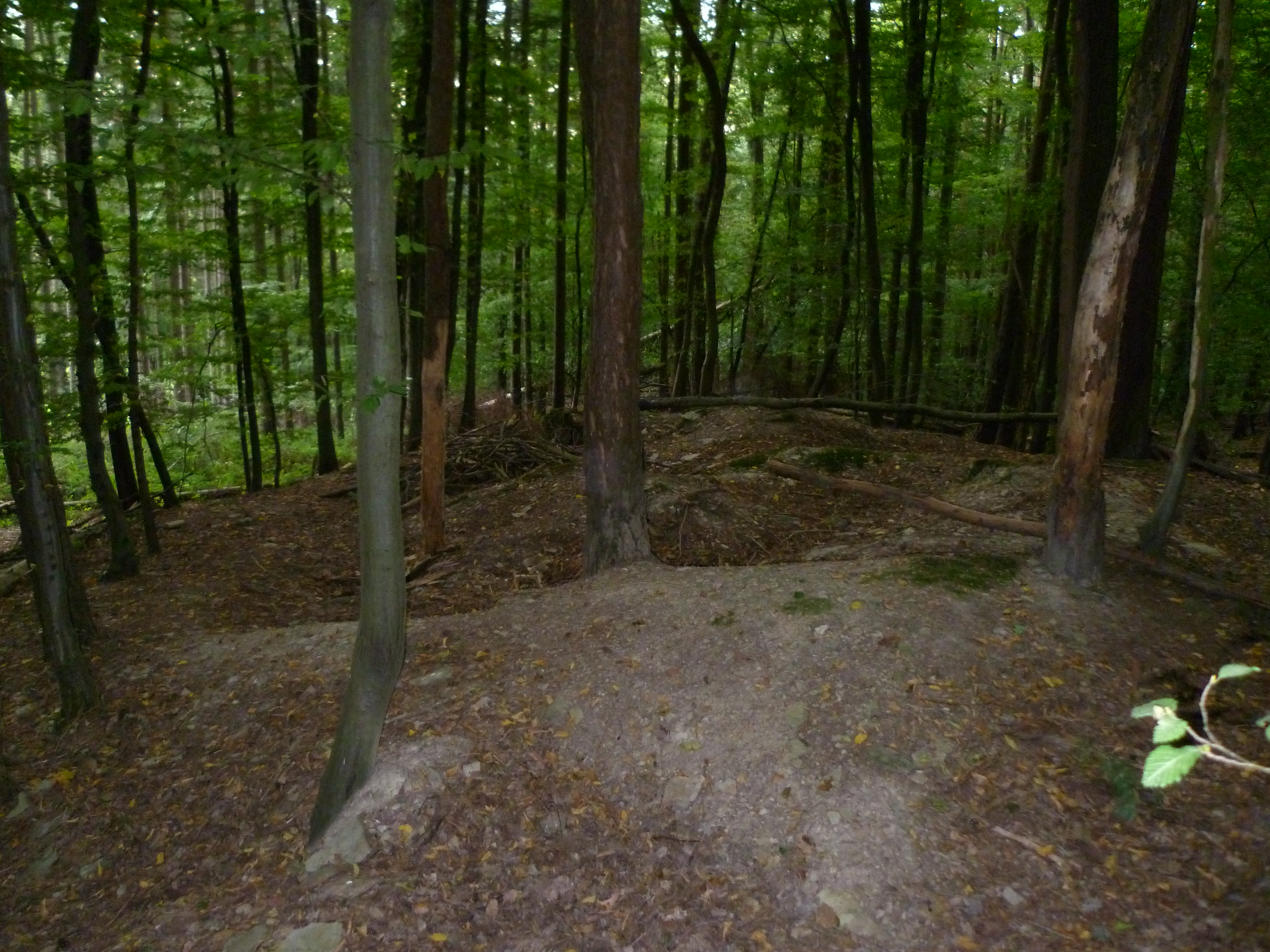 Grabungsstelle des Wachturms 3/25 zwischen Idstein und Niederseelbach